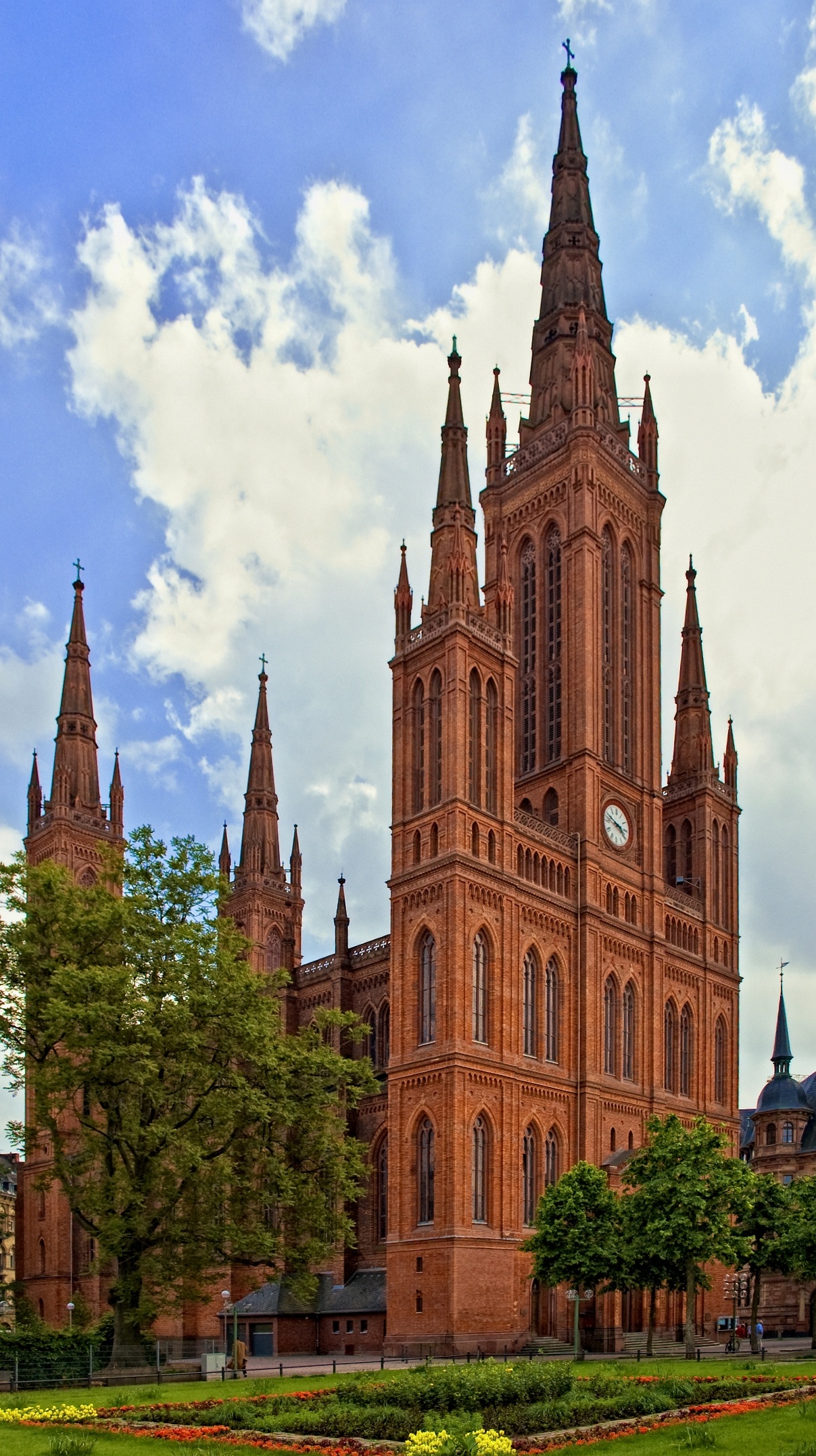 Das Bild zeigt die neugotische Marktkirche in Wiesbaden mit ihren fünf Türmen. Rechts im Bildrand ist das Neue Rathaus zu sehen. Jenseits des Neuen Rathauses befindet sich der Schlossplatz.